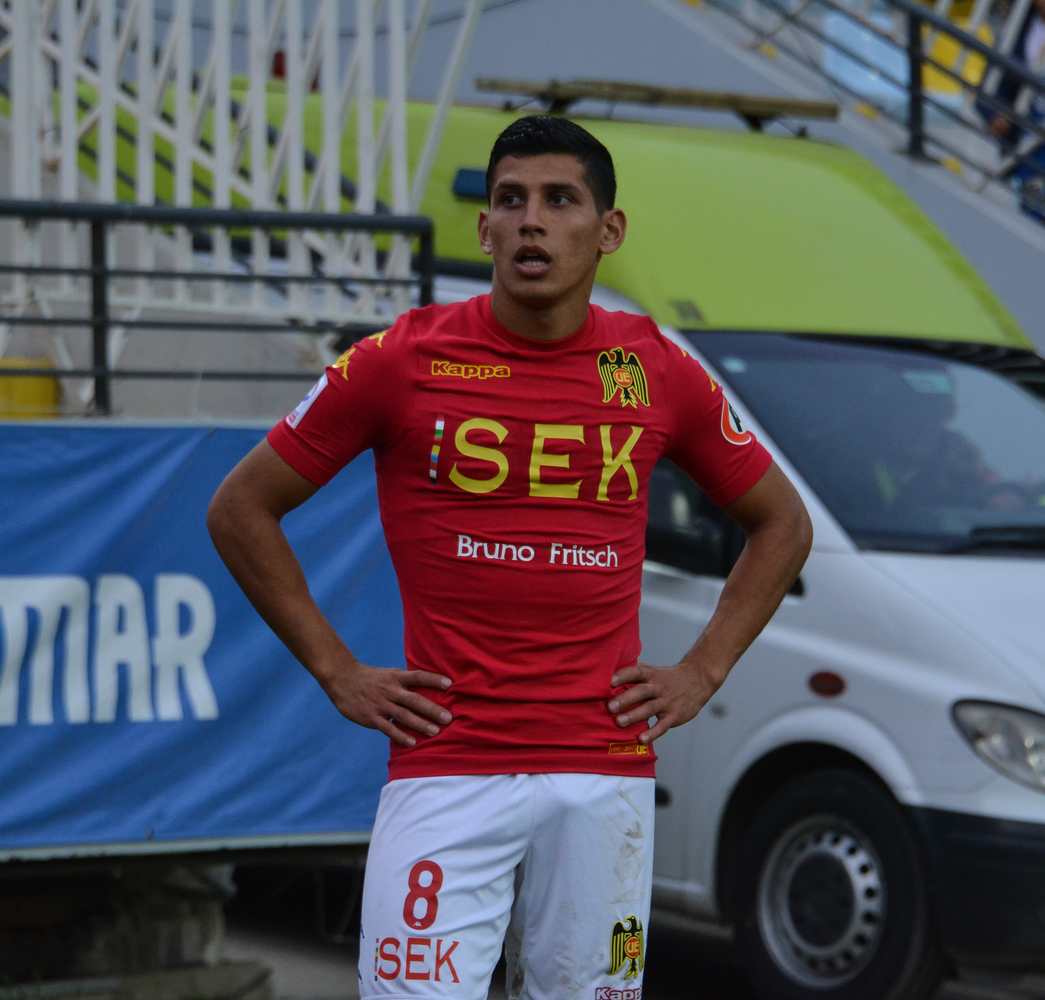 Everton v Unión Española, Estadio Sausalito, Viña del Mar, Chile.